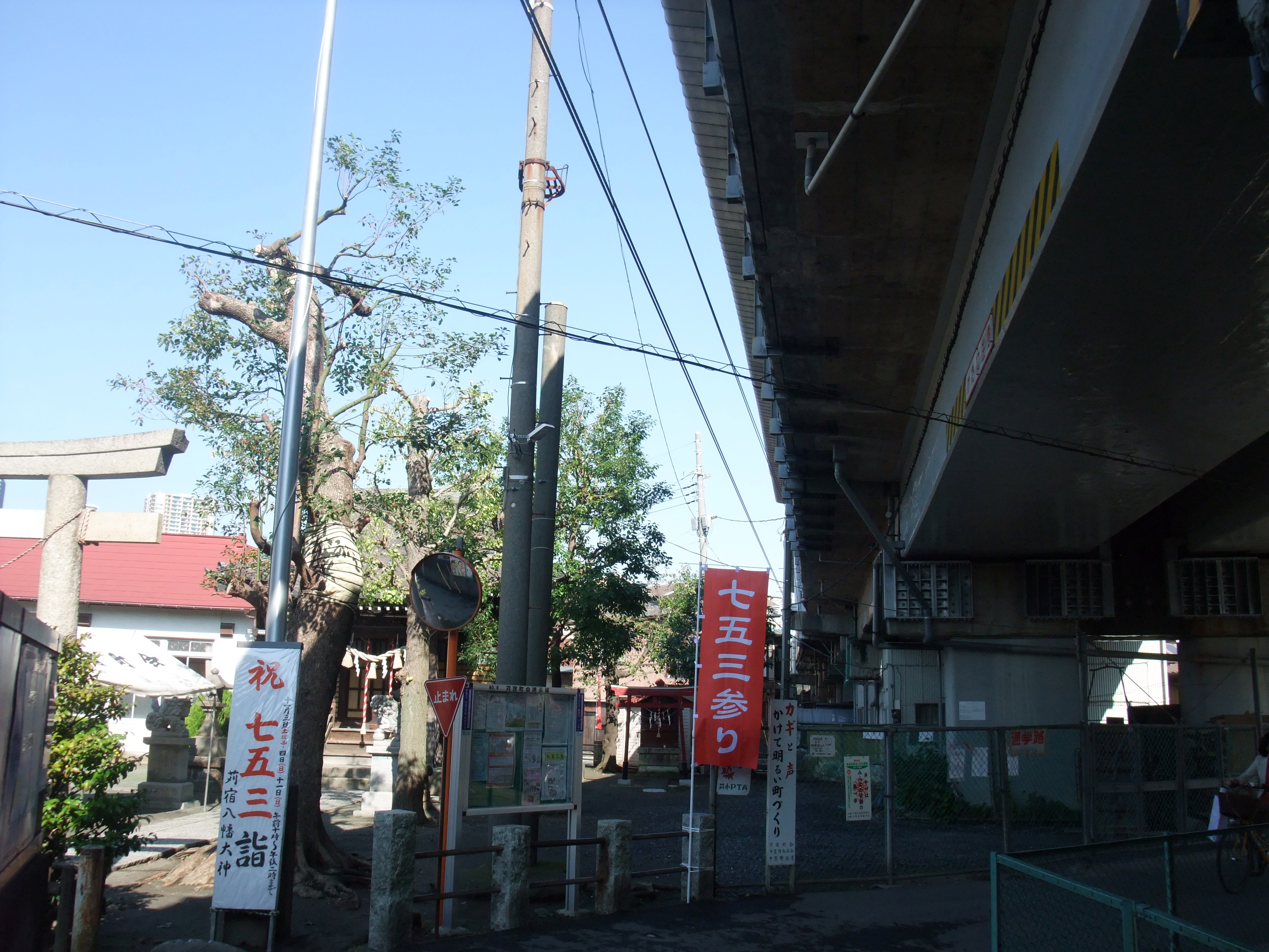 川崎市中区の苅宿八幡宮境内を通過する東海道新幹線高架橋 Fujifilm FinePix F100fd